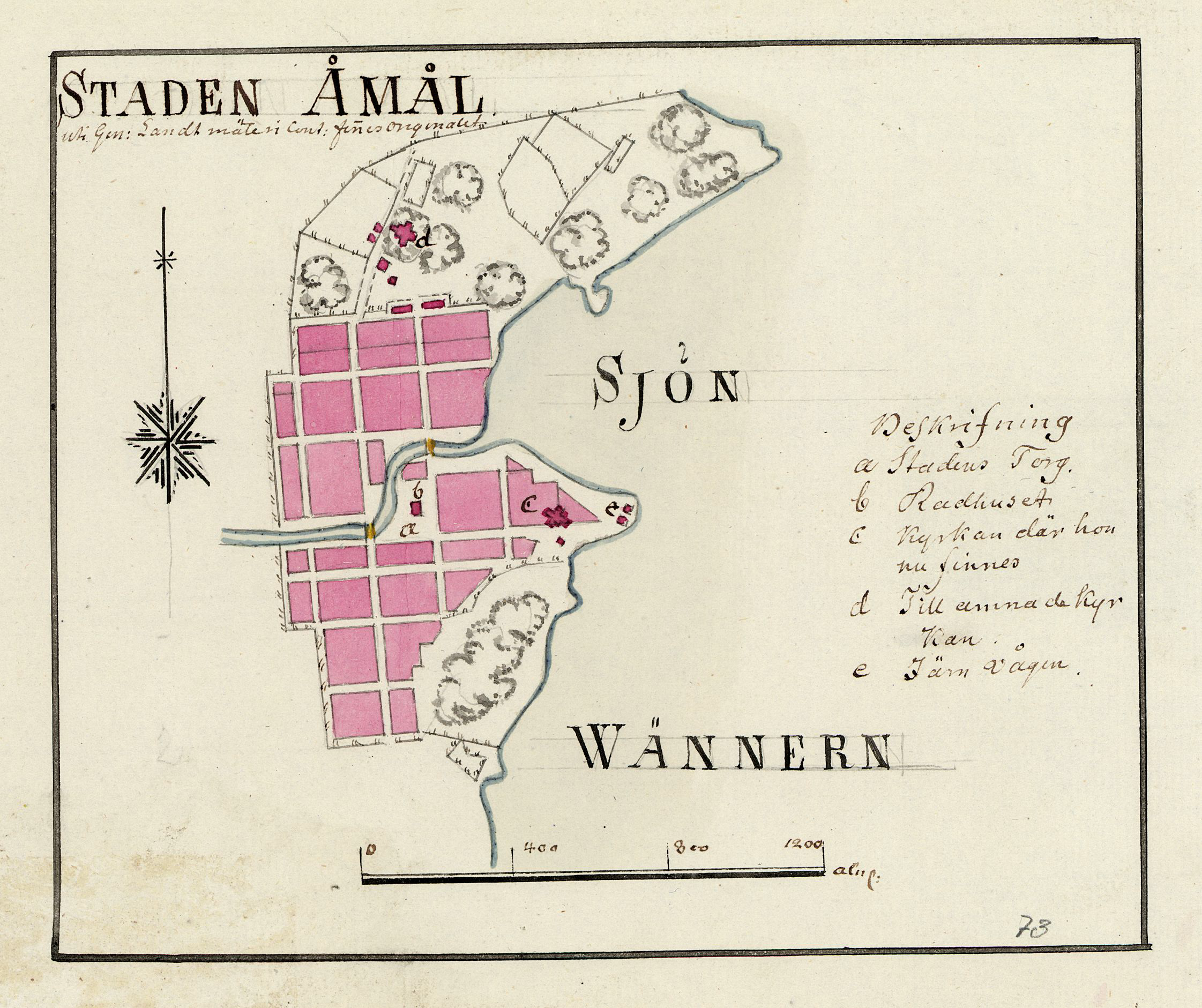 Karta över Åmål från ca: år 1800 av Fredrik Adolf Wiblingen.